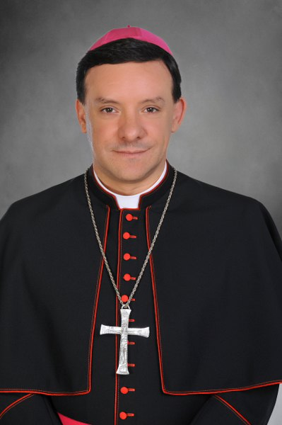 Natural de Caxias do Sul, Pe. Leomar nasceu em 15 de agosto de 1967. Cursou Filosofia na Universidade de Caxias do Sul (UCS) e Teologia na Pontifícia Universidade Católica do Rio Grande do Sul (PUC-RS). Foi ordenado sacerdote em 20 de dezembro de 1992. Bispo de Tigava e auxiliar da Arquidiocese de Porto Alegre. Em sua caminhada presbiteral, padre Leomar foi vigário da paróquia Teresa e da Catedral Diocesana de Caxias do Sul de 1992 a 2001. Desde 1993, estava como diretor do Curso de Teologia para Leigos da diocese de Caxias do Sul. Coordenou e lecionou nos cursos de pós-graduação em Ensino Religioso e Teologia Pastoral na Universidade de Caxias do Sul. Desde 2005 atua como professor na Faculdade de Teologia (PUC-RS), onde é coordenador do Programa de Pós-graduação em Teologia. Realiza pesquisas e ensino nas disciplinas de Antropologia Teológica, Moral Social, Pastoral Catequética e Pastoral Urbana.